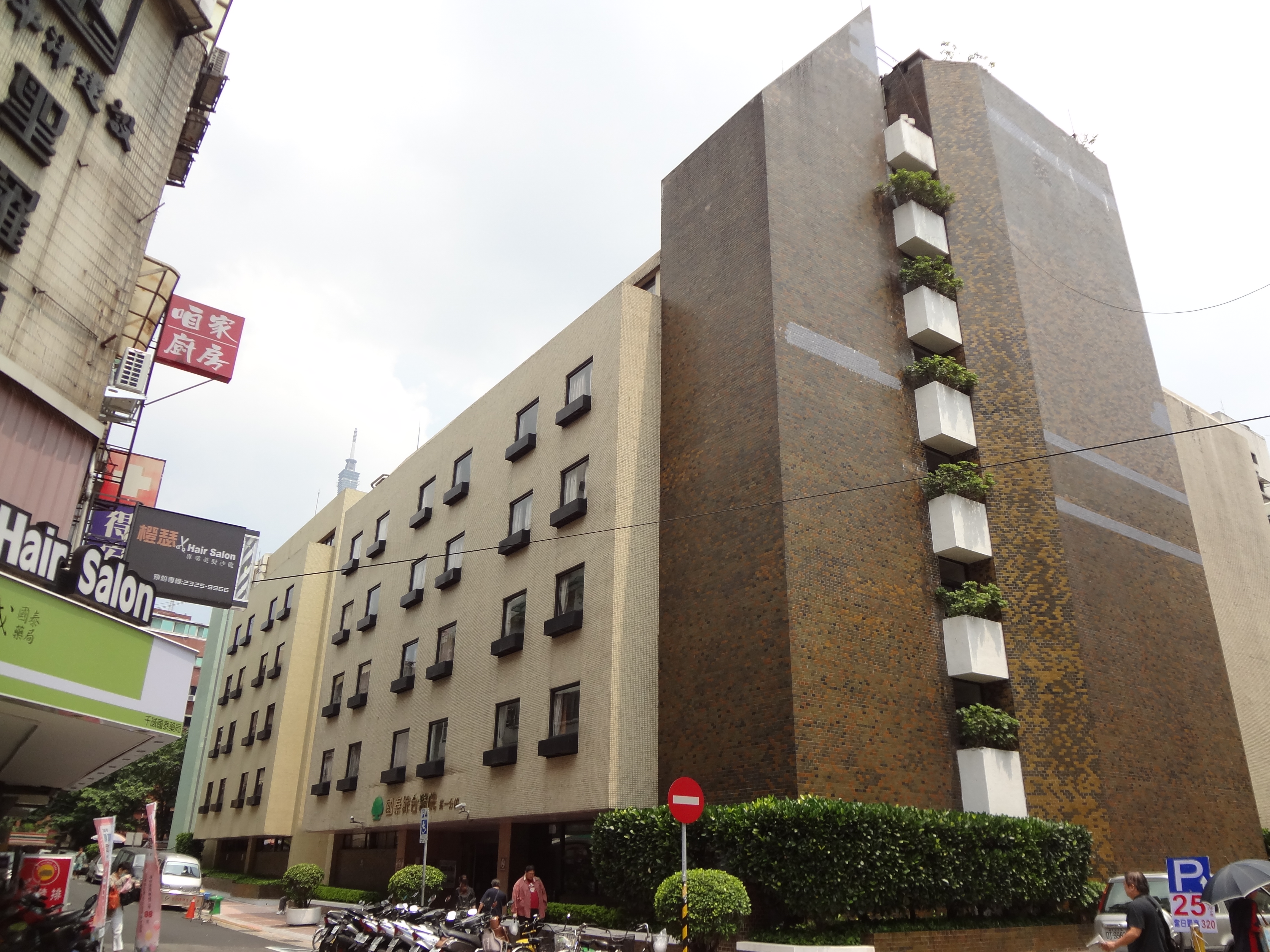 國泰綜合醫院總院第一分館。